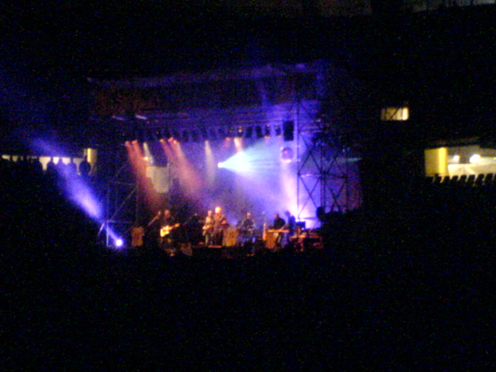 Züri West am 14. März 2008 im Stade de Suisse / Zueri West on a gig in Stade de Suisse, Berne